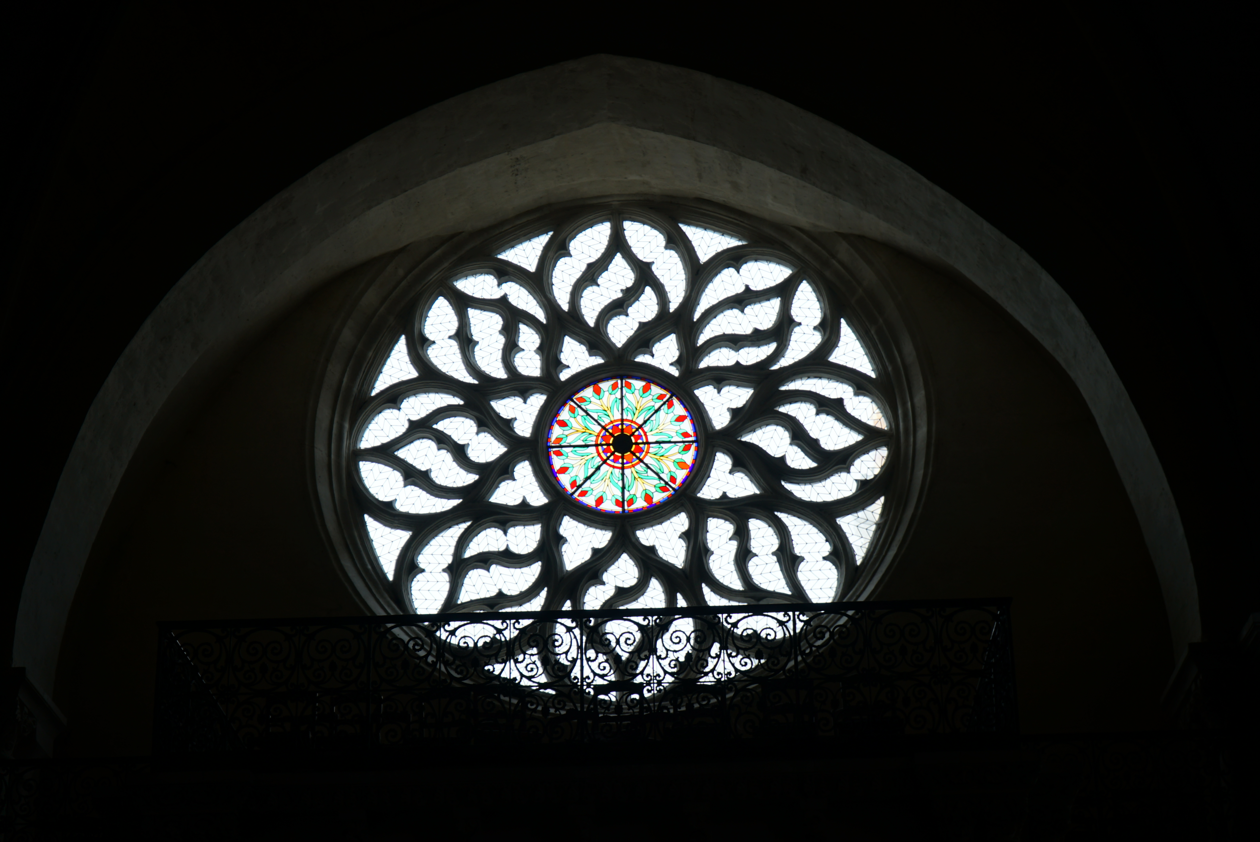 en l'Église Saint-Léger (Cognac)